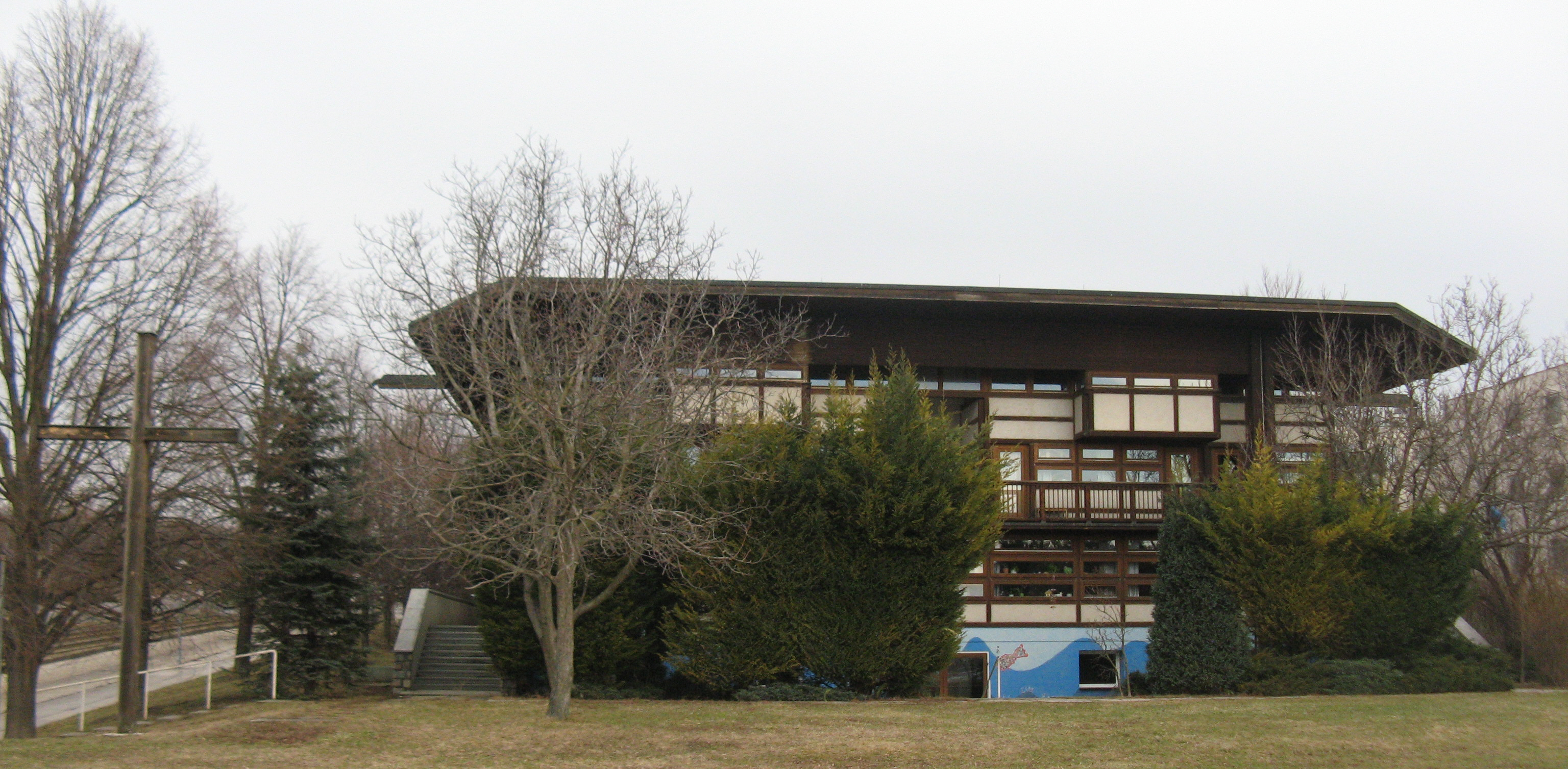 Pfarrkirche Salvator am Wienerfeld (1978-79) von Johannes Spalt, Neilreichgasse 143, Wien-Favoriten